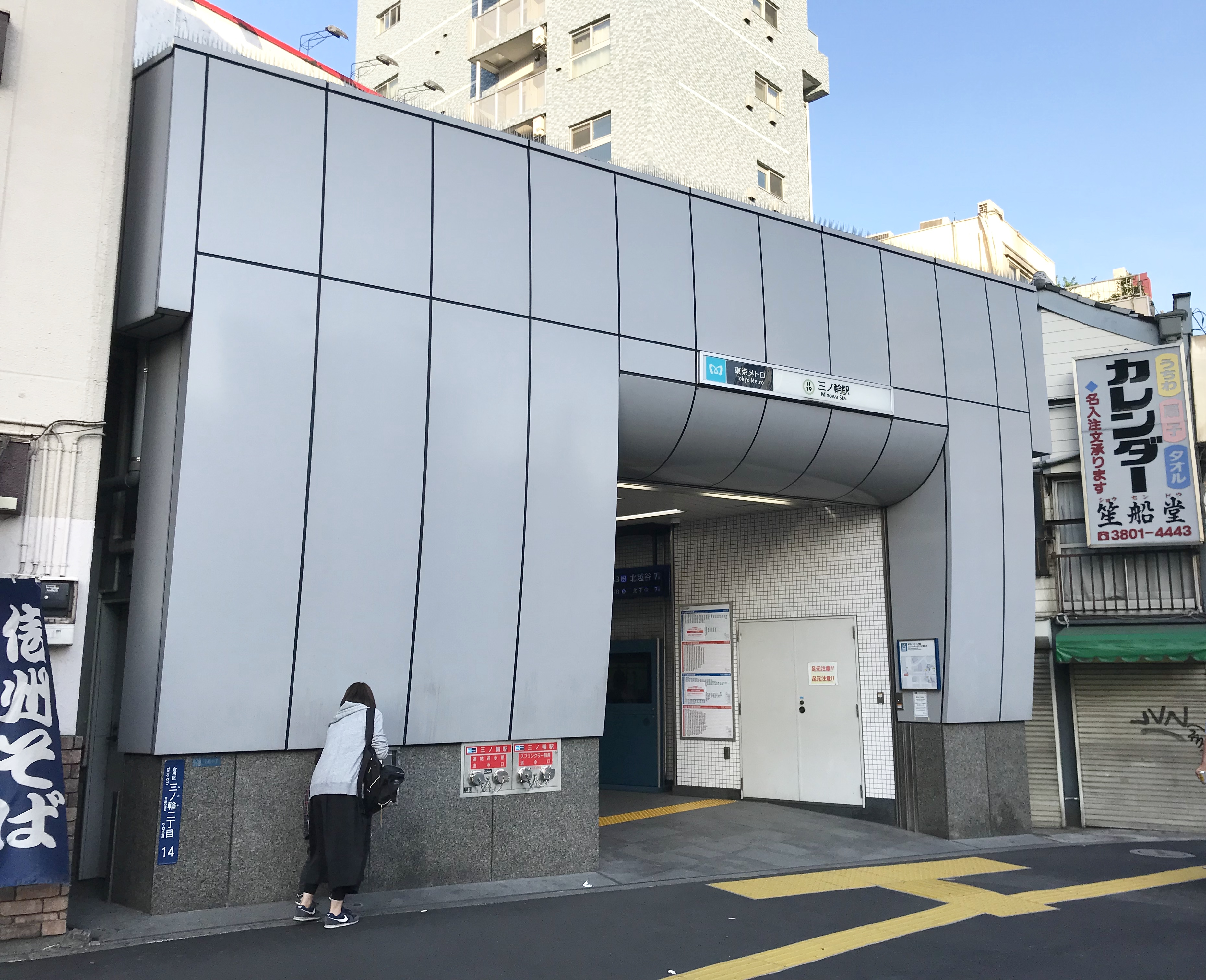 東京メトロ日比谷線三ノ輪駅3番出入口